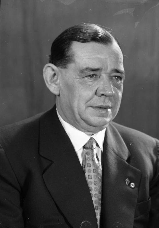 Karl Maron Zentralbild/Junge 28.12.1957 [Herausgabedatum] Das Mitglied des Präsidiums des Ministerrates der Deutschen Demokratischen Republik und Minister des Inneren, Karl Maron. [Porträt Karl Maron] Abgebildete Personen: Maron, Karl: Innenminister, Generaloberst, Volkskammerabgeordneter, SED, DDR